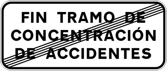 Señal que indica el fin de un tramo de concentración de accidentes.